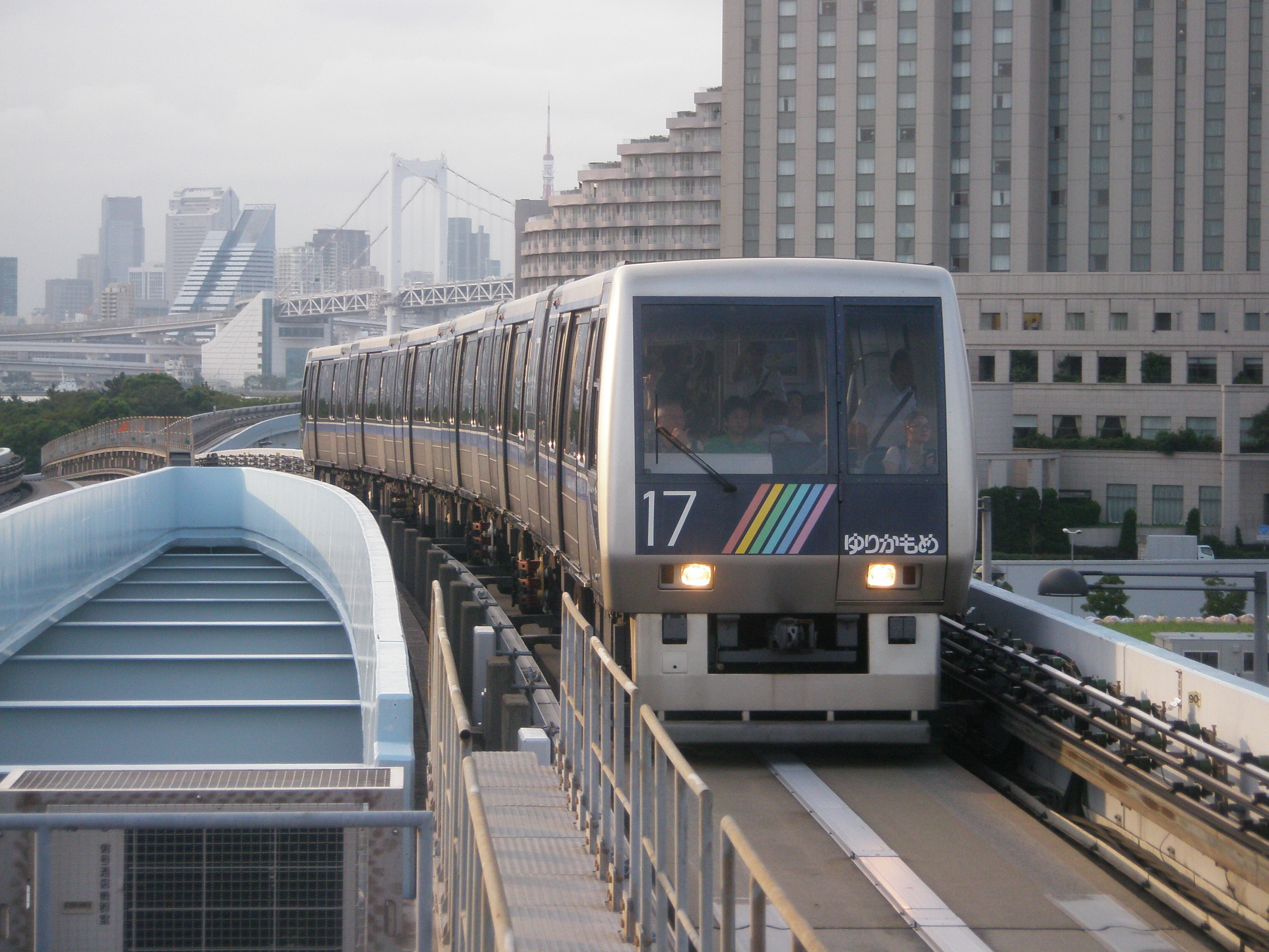 ゆりかもめ7000系電車、船の科学館駅にて